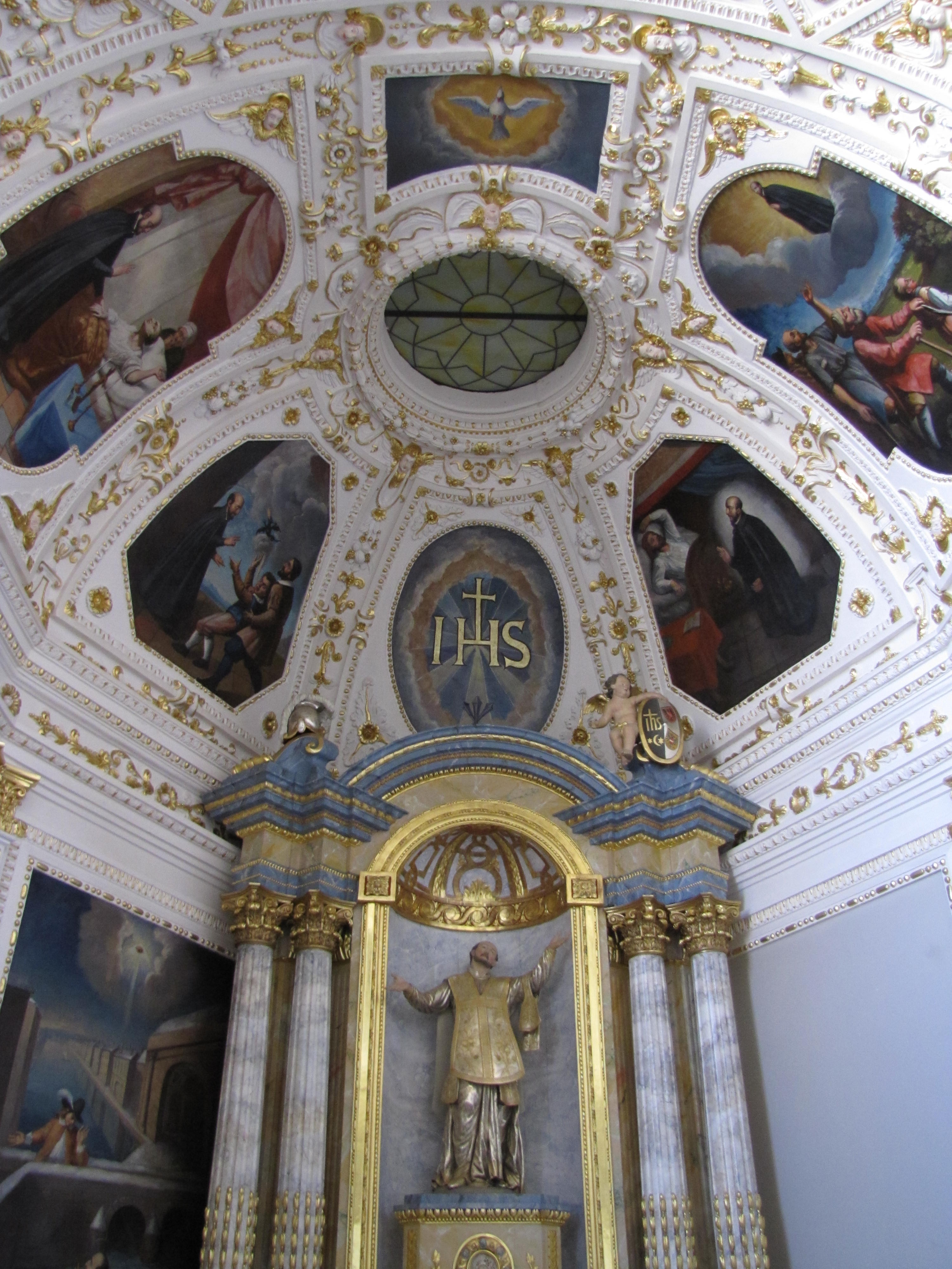 Alsace, Bas-Rhin, Église Saint-Georges de Molsheim, ancienne église des Jésuites (1618) (PA00084798, IA67006097). Décor stuqué (Jean KUHN et Michael CASTELO, XVIIe): Peintures murales "Vie de St-Ignace de Loyola" (Zebedäus MÜLLER, Carolus FISCHER, XVIIe-XVIIIe-XIXe): Autel-retable de St-Ignace de Loyola (XVIIIe): This object is classé Monument Historique in the base Palissy, database of the French furniture patrimony of the French ministry of culture, under the references PM67000531 and IM67009668.